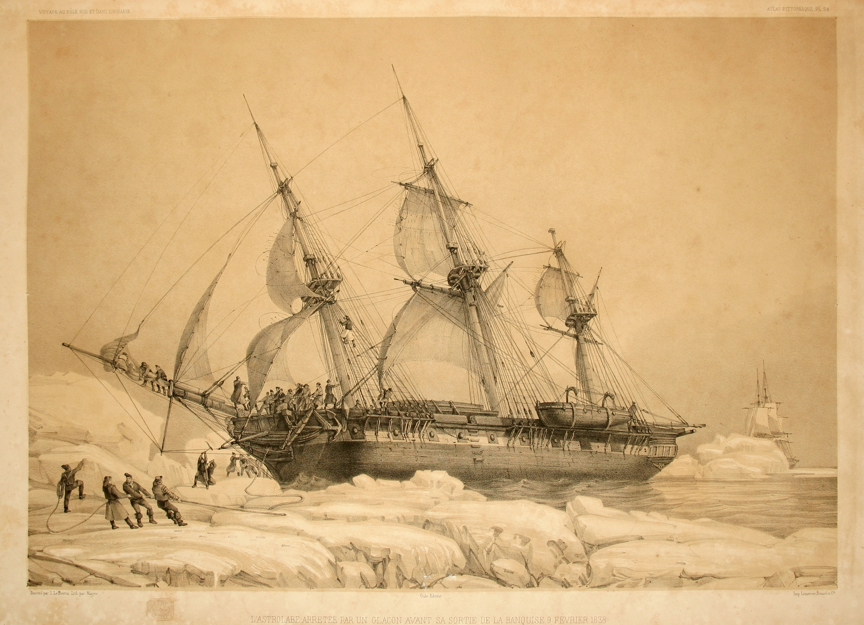 L' Astrolabe àrrétée par un glaçon le 9 février 1838. Atlas pittoresque, planche 24